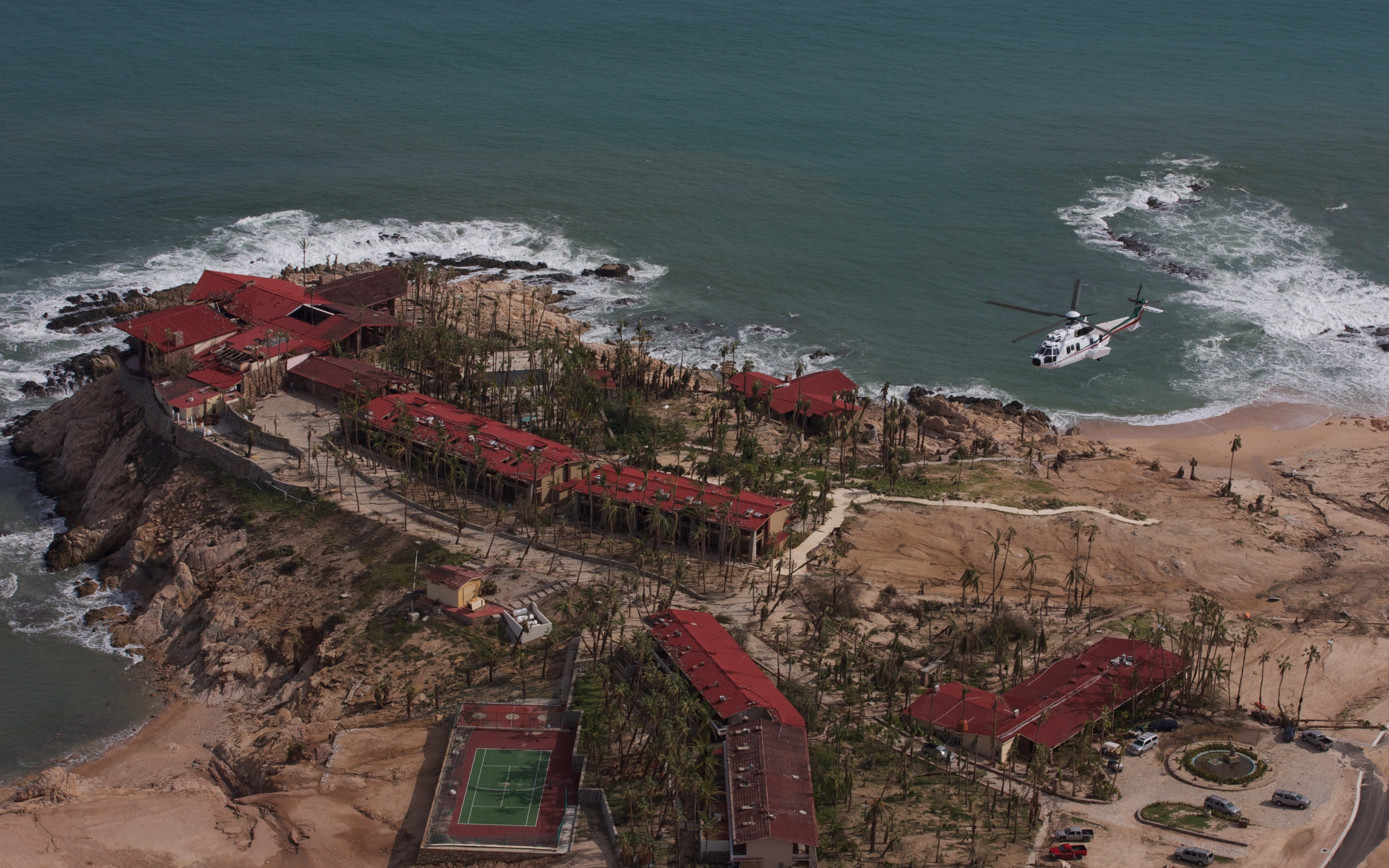 Visita a zonas afectadas en Los Cabos, Baja California. Los Cabos, Baja California. 16 de septiembre de 2014.